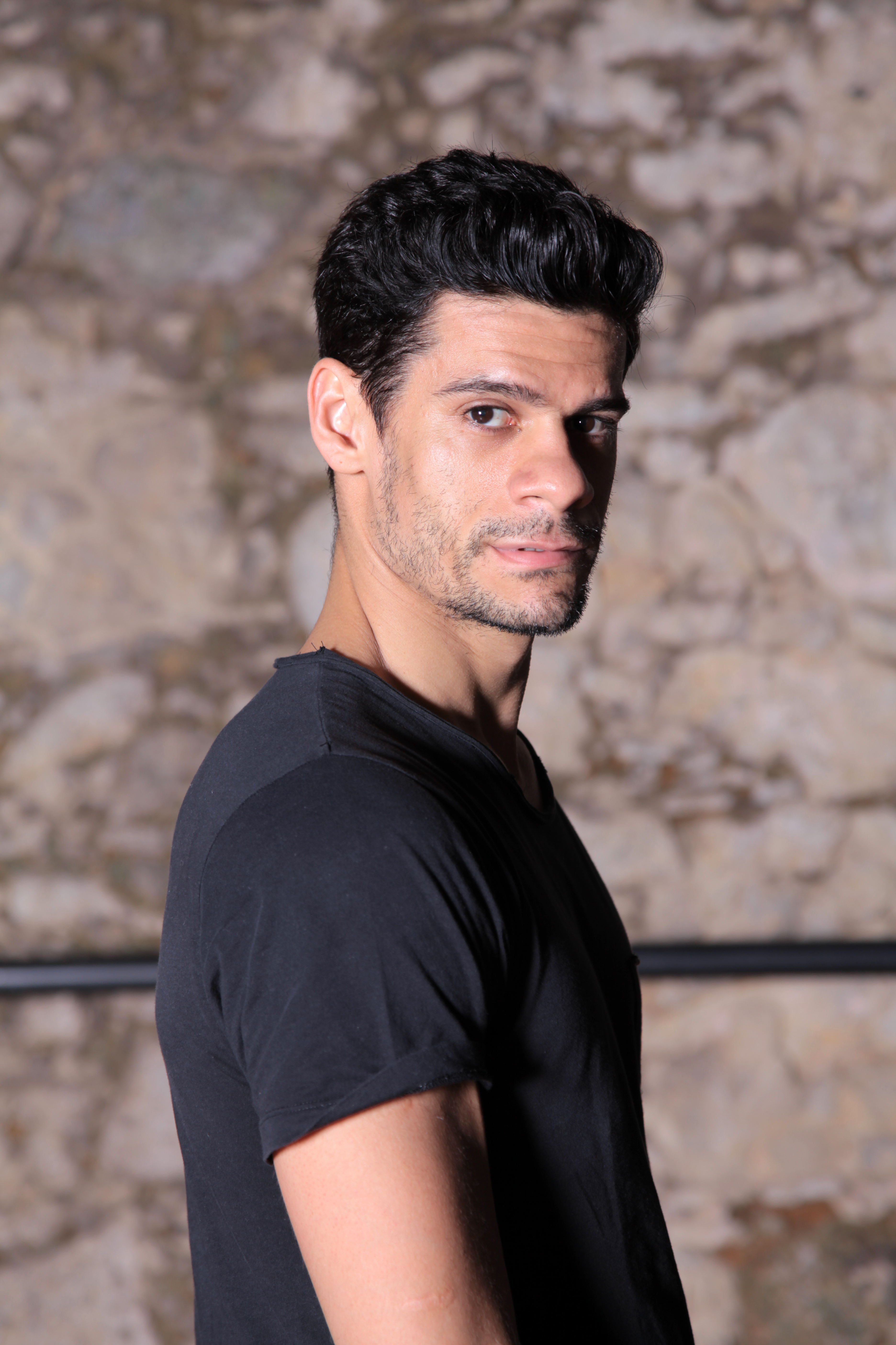 Thiago em ensaio